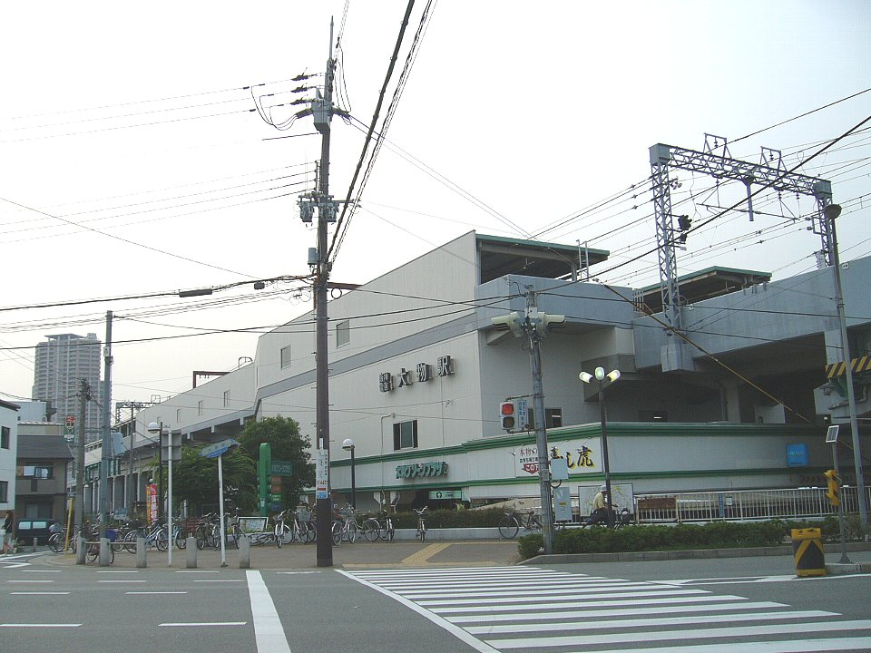 阪神大物駅 駅舎 2006年6月撮影